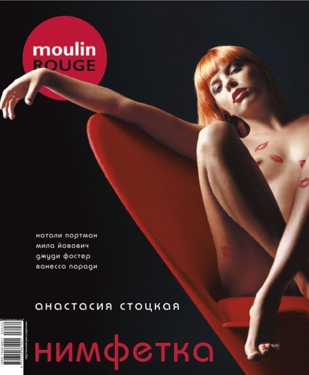 Обложка журнала Moulin Rouge с Анастасией Стоцкой